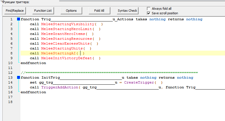 Стандартный триггер в расширенном редакторе JNGP.